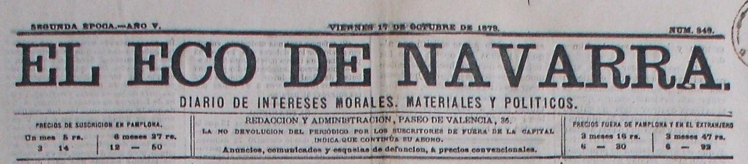 Cabecera del periódico El Eco de Navarra, de 1879